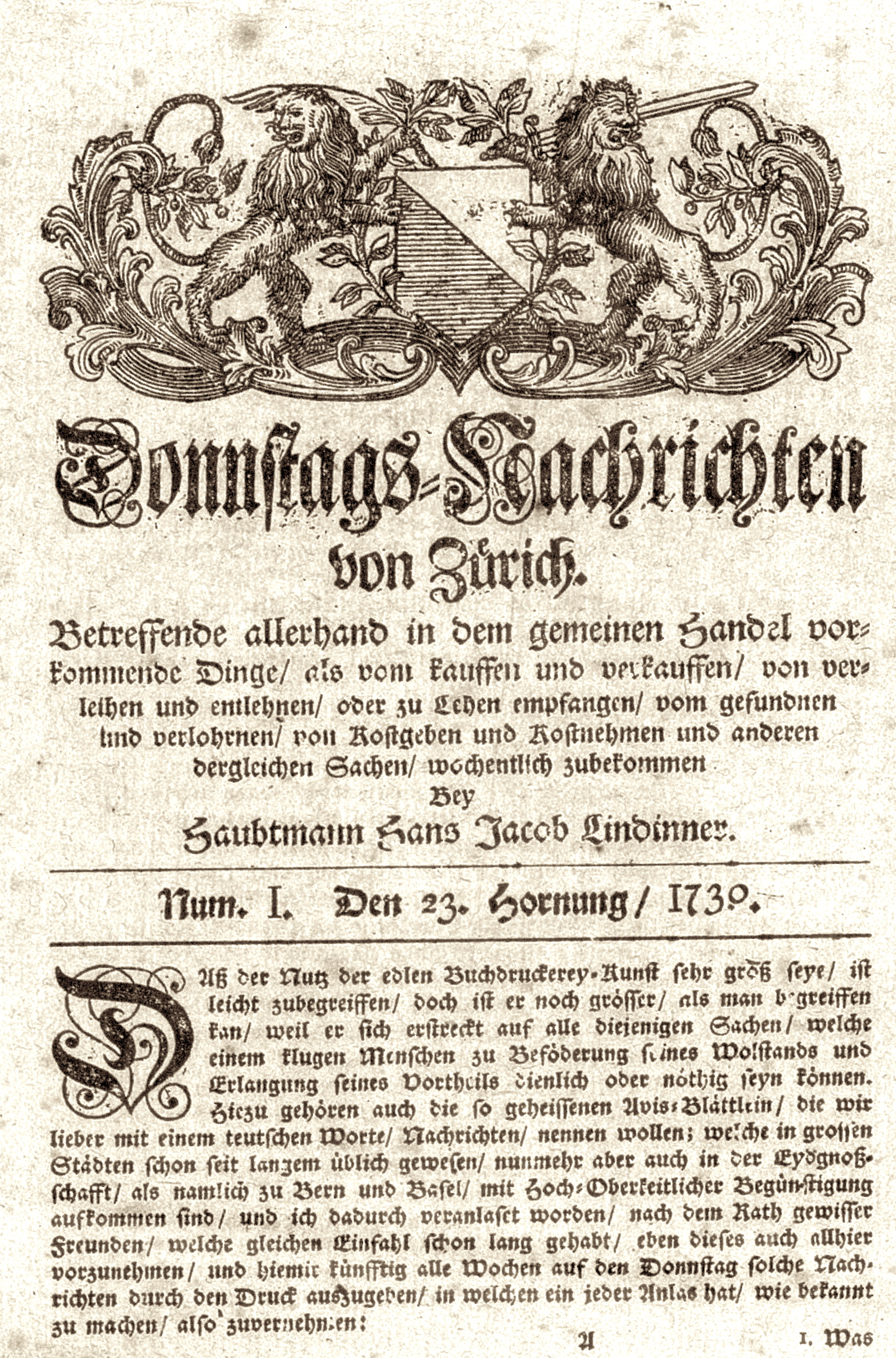 Erste Ausgabe vom Tagblatt der Stadt Zürich am 23. Februar 1730